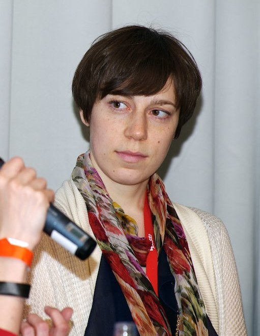 Svenja Schröder, Helga Christina Hansen, Rochus Wolff, Chris Köver, Ina Freudenschuß „Feministische Netzkultur 2.0“, Kalkscheune Grosser Saal